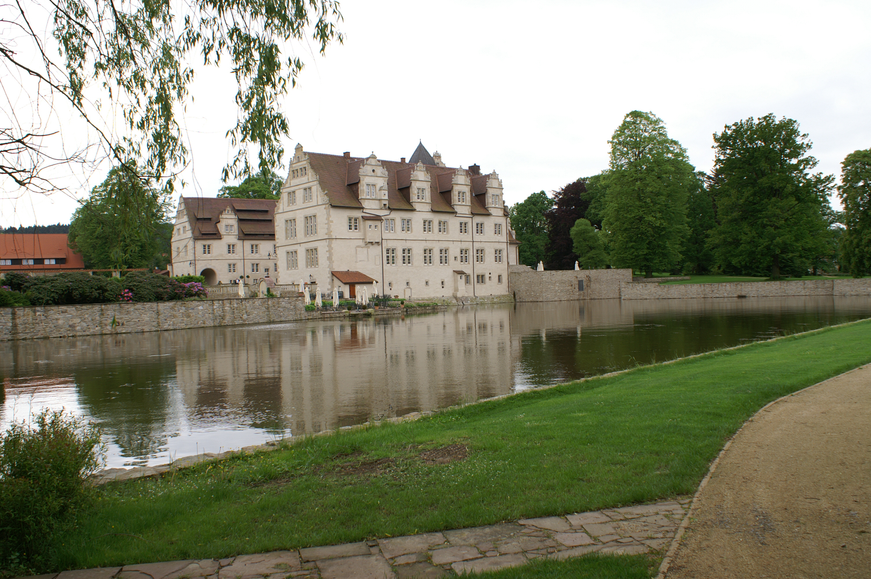 Ansicht von Schloss Schwöbber bei Aerzen in der Nähe von Hameln vom Park